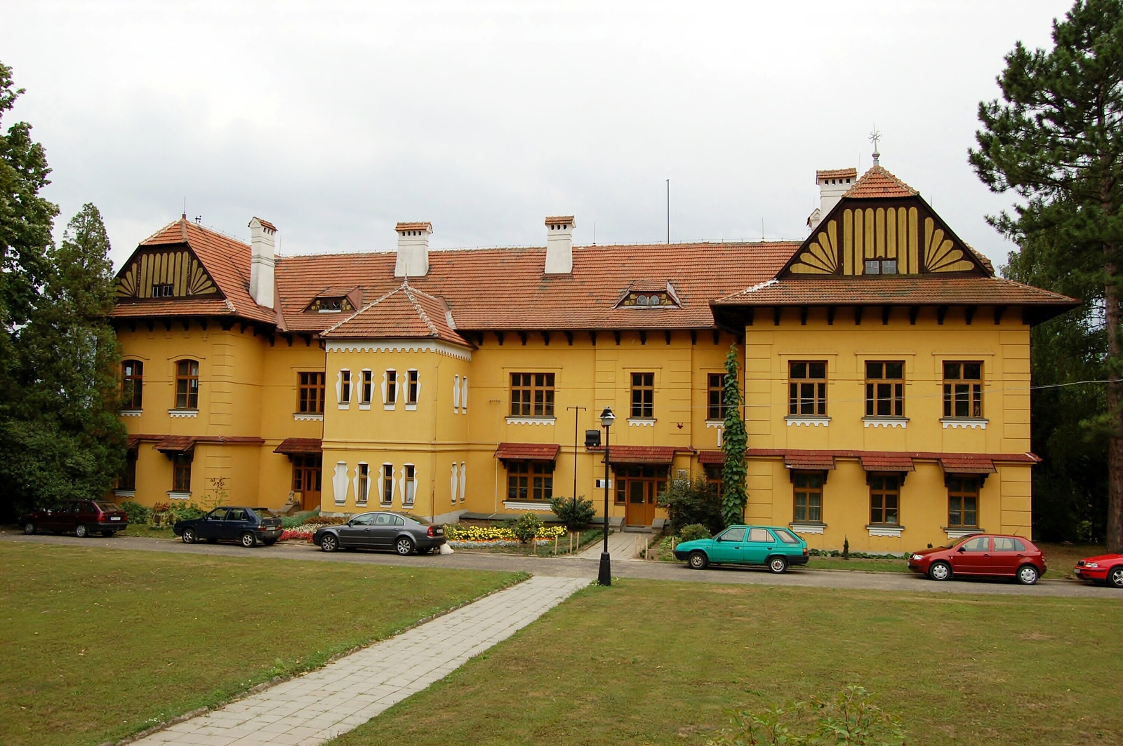 Škola - býv. Český pomologický ústav (Brno), Lány 161, Brno